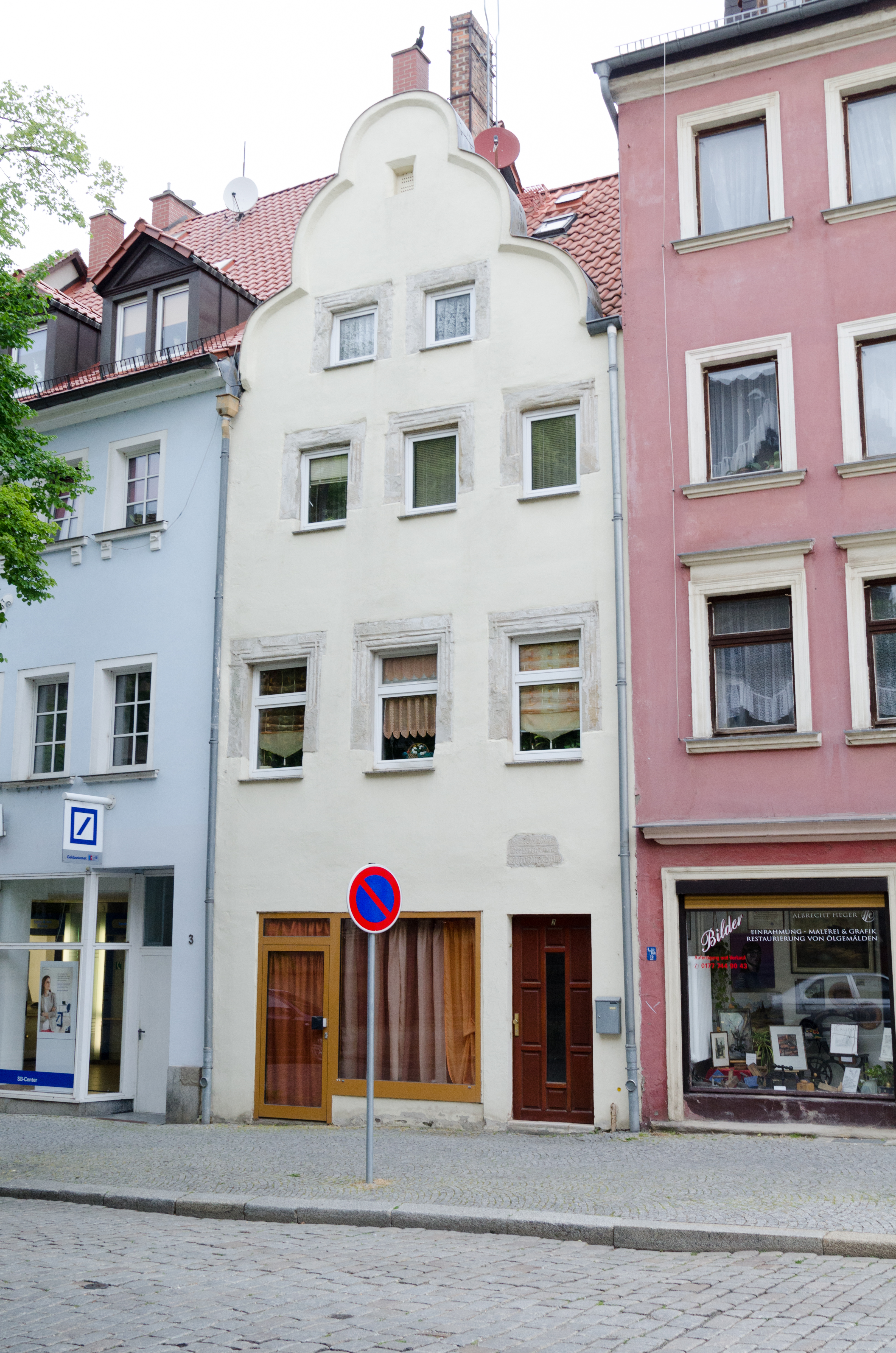 Zeitz, Brüderstraße 2